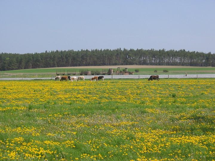 Zauche_bei_Beelitz, Brandenburg, selbst fotografiert, Mai 2004, GNU FDL